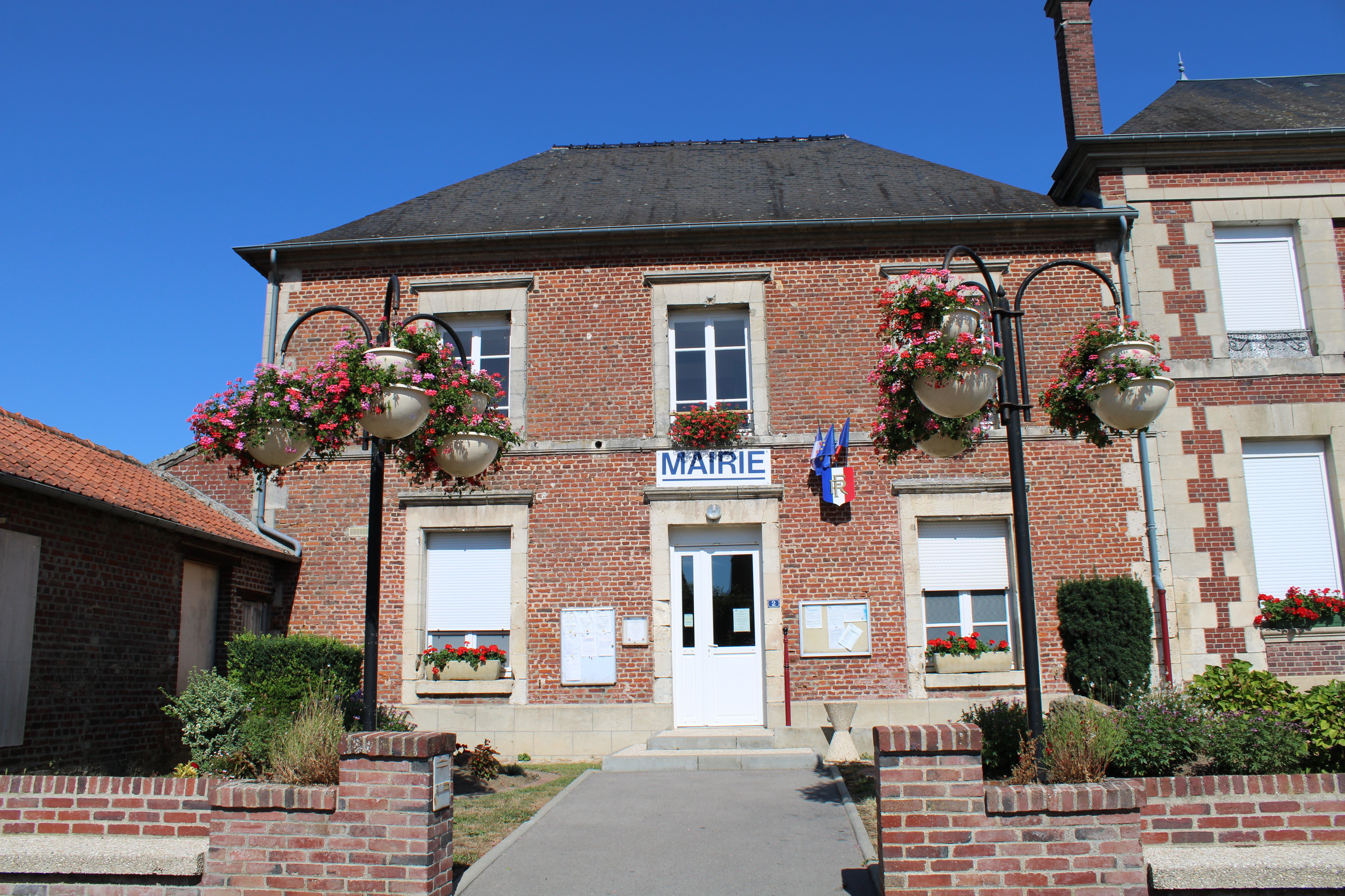 La mairie